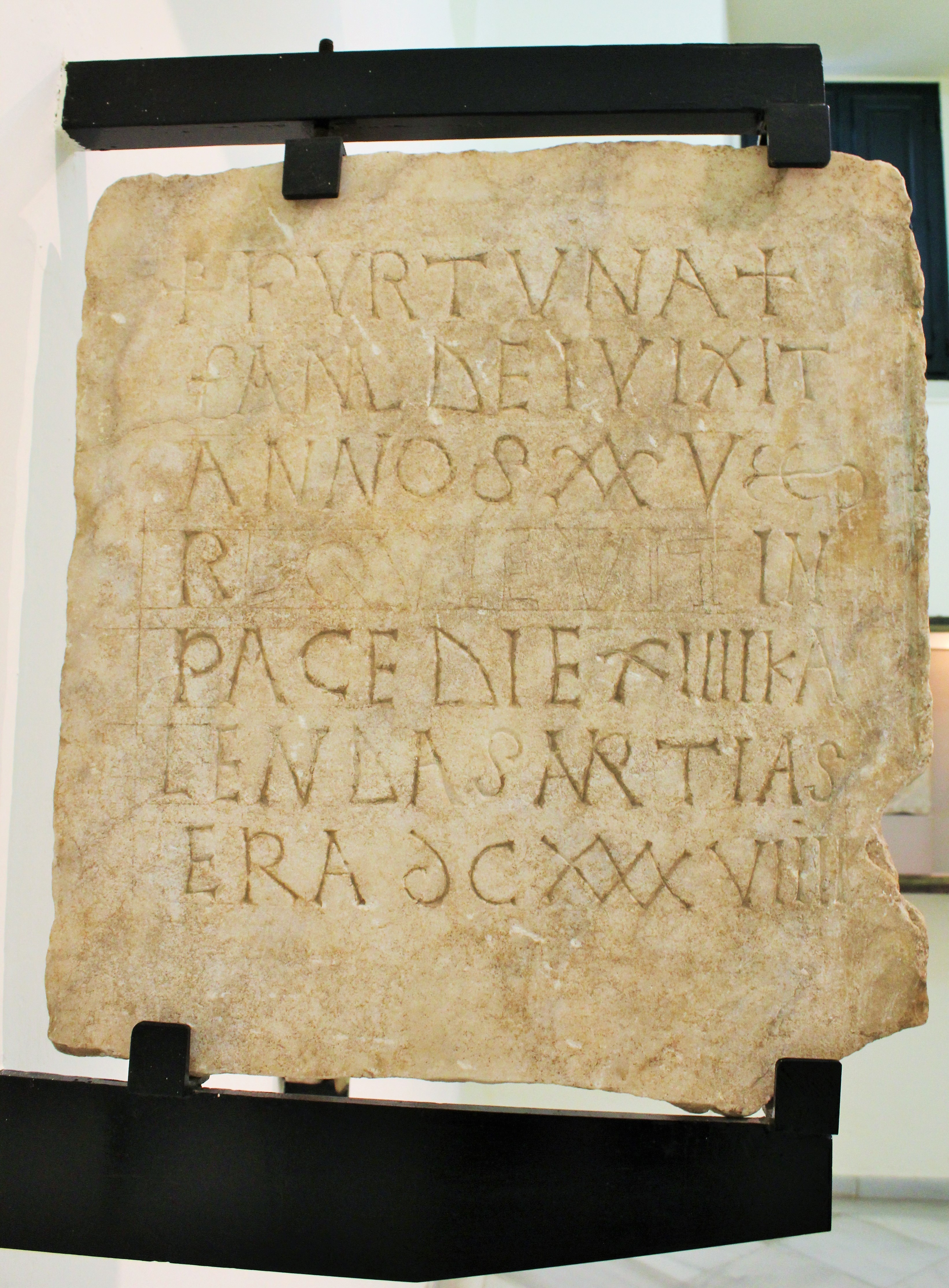 A causa de un error, el cantero volteó la pieza y rehizo la inscripción. [cruz monogramática] [cruz] FVRTVNA FAMVLA DEI VIXIT ANNOS XXV REQUIEVIT IN PACE DIA XIIII KALENDAS MARTIAS ERA DCXXXVIIII La frase sin error está en la cara B cuya traducción es: "Fortuna, sierva de Dios, de 25 años descansó en paz el día 14 de las Calendas de Marzo de la Era Hispánica de 639" (~16 de Febrero de 601 d.C.)